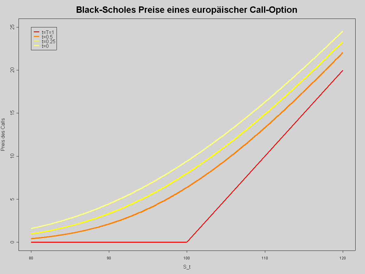 Preise für unterschiedliche Zeitpunkte für verschiedene Spotpreise eines Calls im Black-Scholes Modell